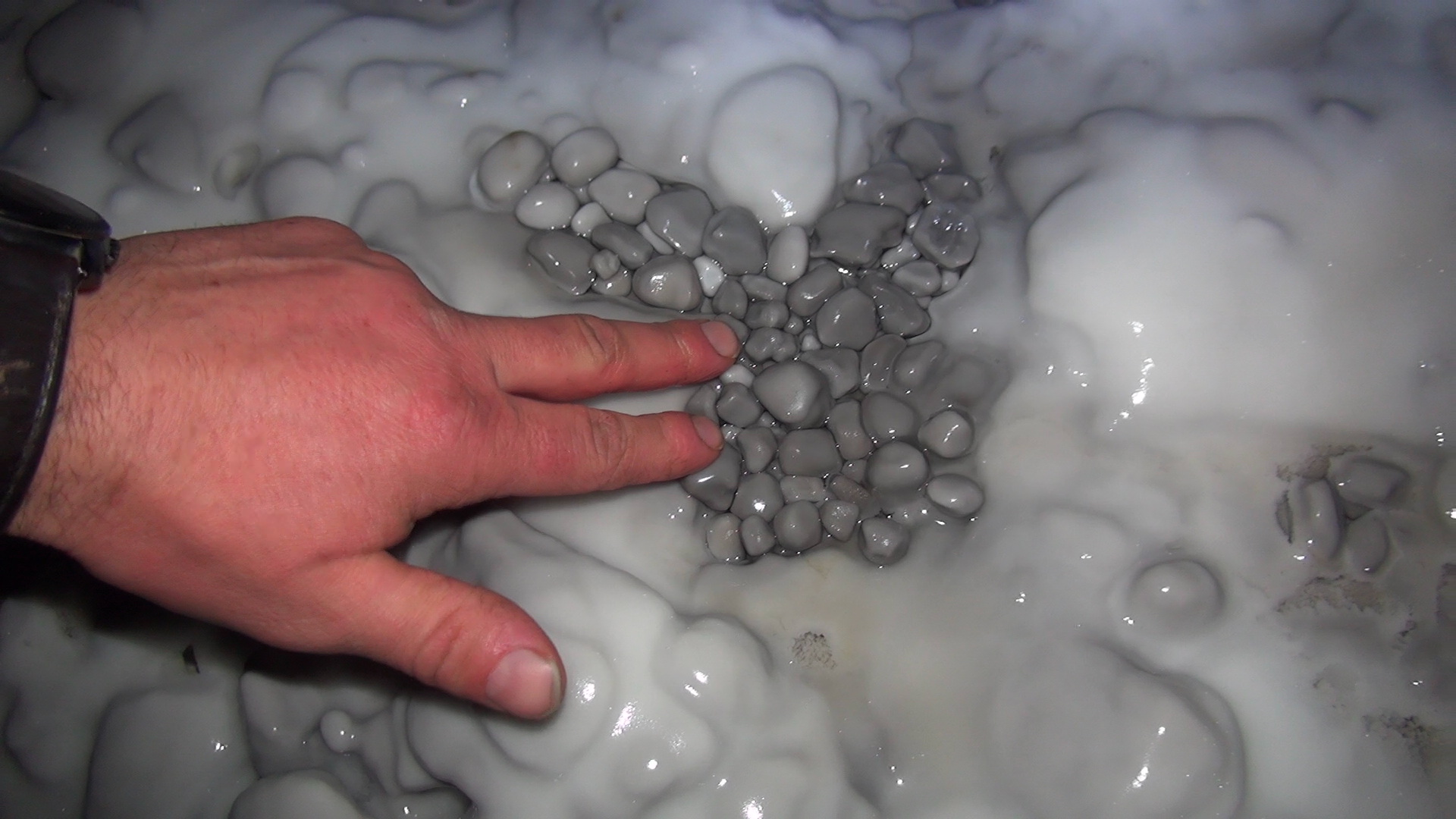 diversité des perles de cavernes